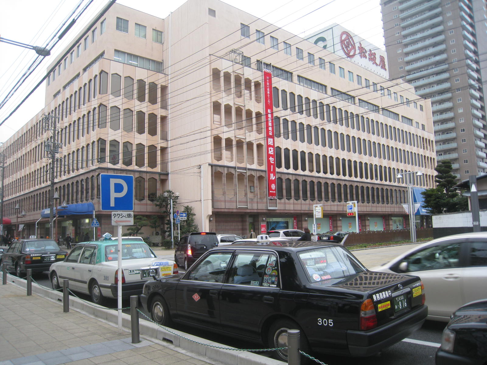 松坂屋岡崎店、2010年1月31日撮影